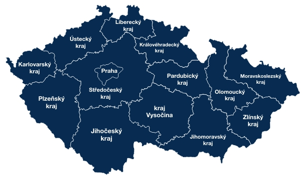 mapa regionálních kanceláří agentury pro podporu podnikání a investic CzechInvest